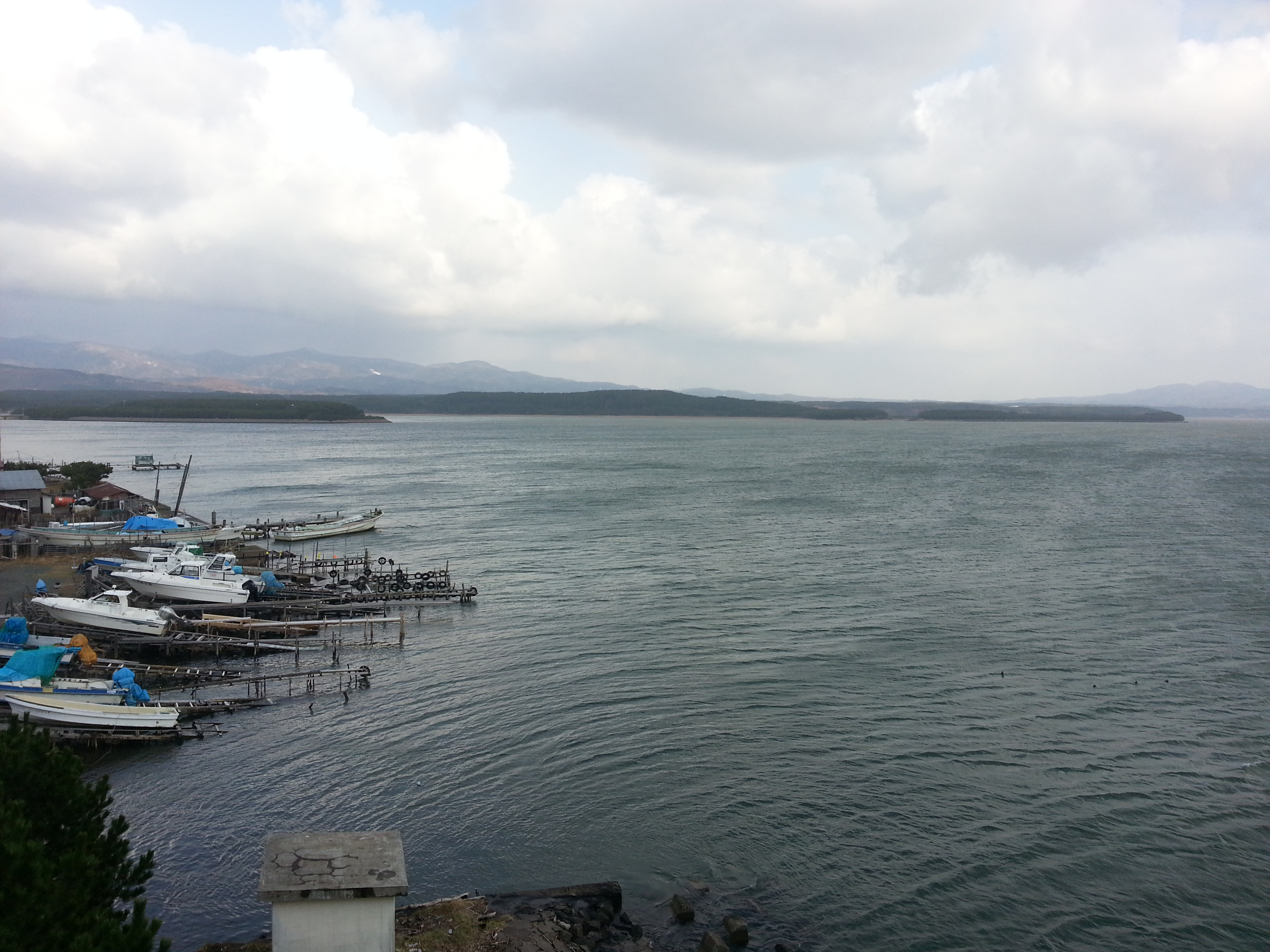 青森県津軽半島北西部にある十三湖。十三湖大橋より撮影。